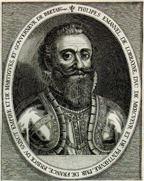 Philippe-Emmanuel de Lorraine, duc de Mercœur (* 9. September 1558; † 19. Februar 1602) war ein französischer Heerführer der Hugenottenkriege.